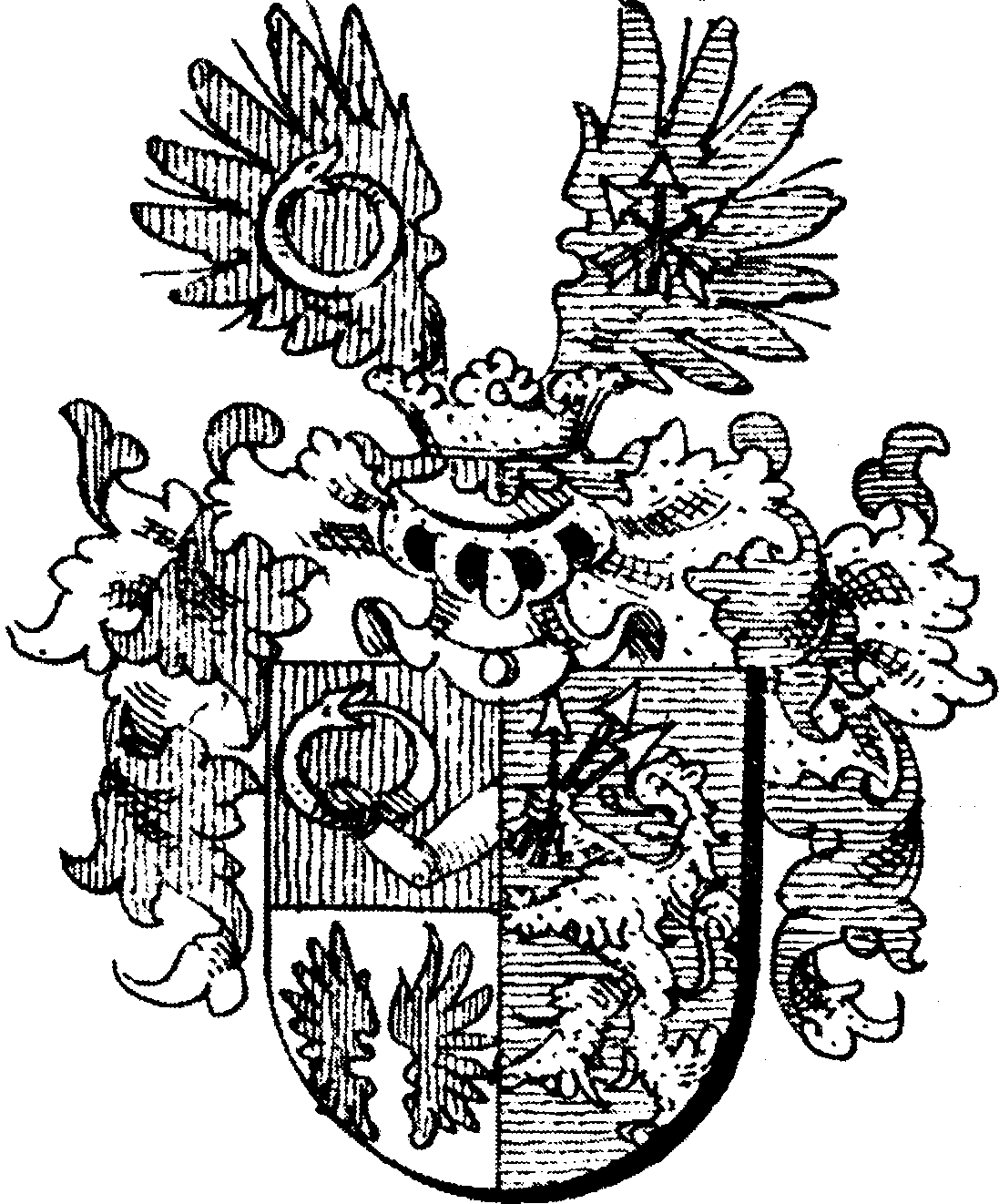 Érdekesség a saját farkába harapó Uroborosz kígyó